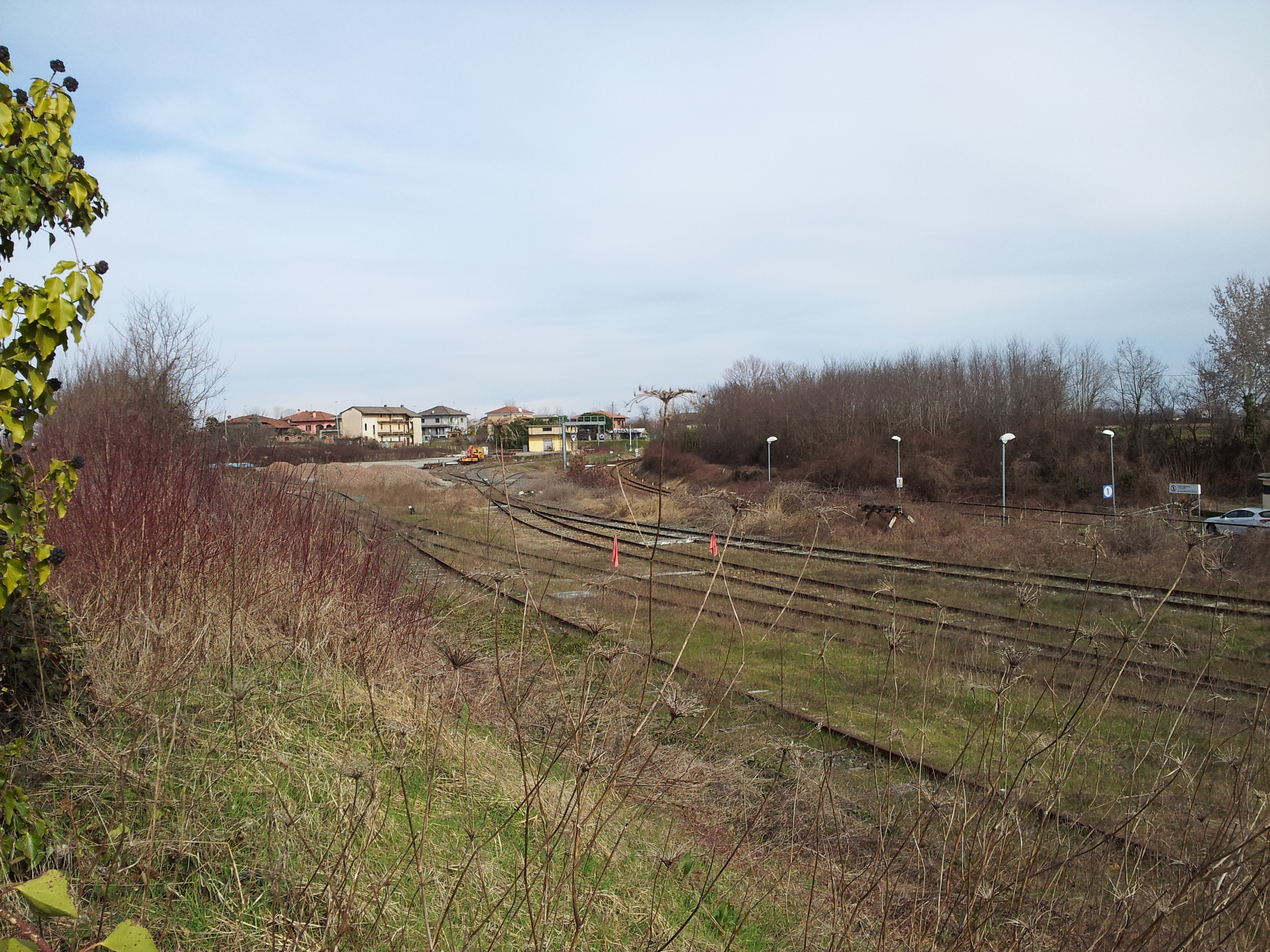 Piano intermedio delle due stazioni usato per lo scalo e per l'interscambio dei treni tra le linee Santhià-Arona e Biella-Novara. Foto scattata dalla stazione di Rovasenda Alta.